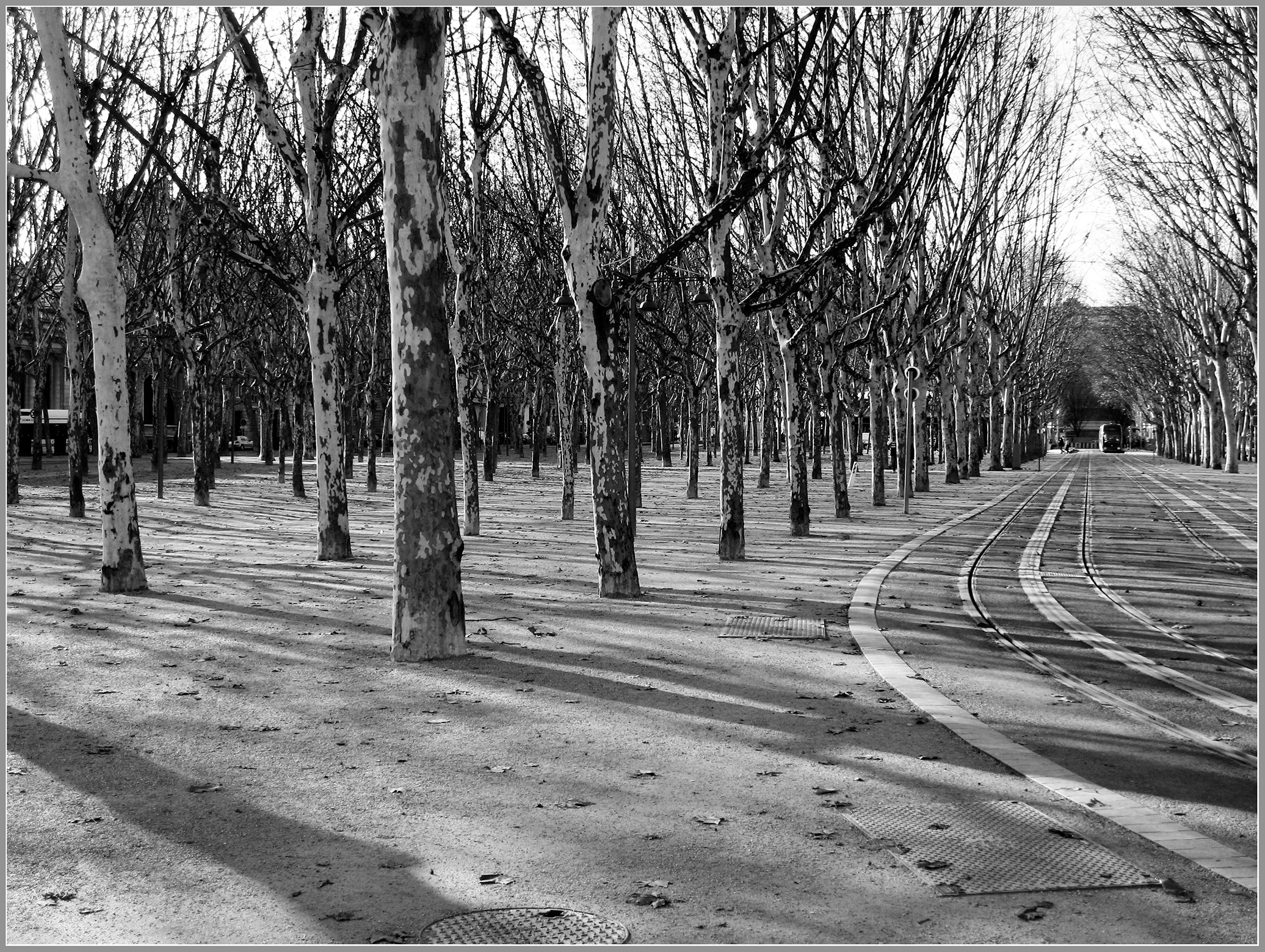 Place des Quinconces in Bordeaux, France.